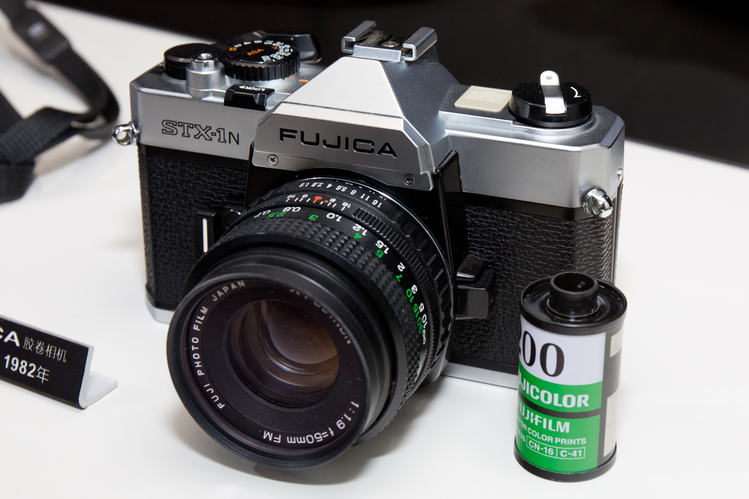 P&E China 2016: 1982 Fujica STX-1N